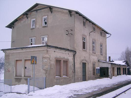 Bahnhof Putzkau selbst erstellt und auf veröffentlicht